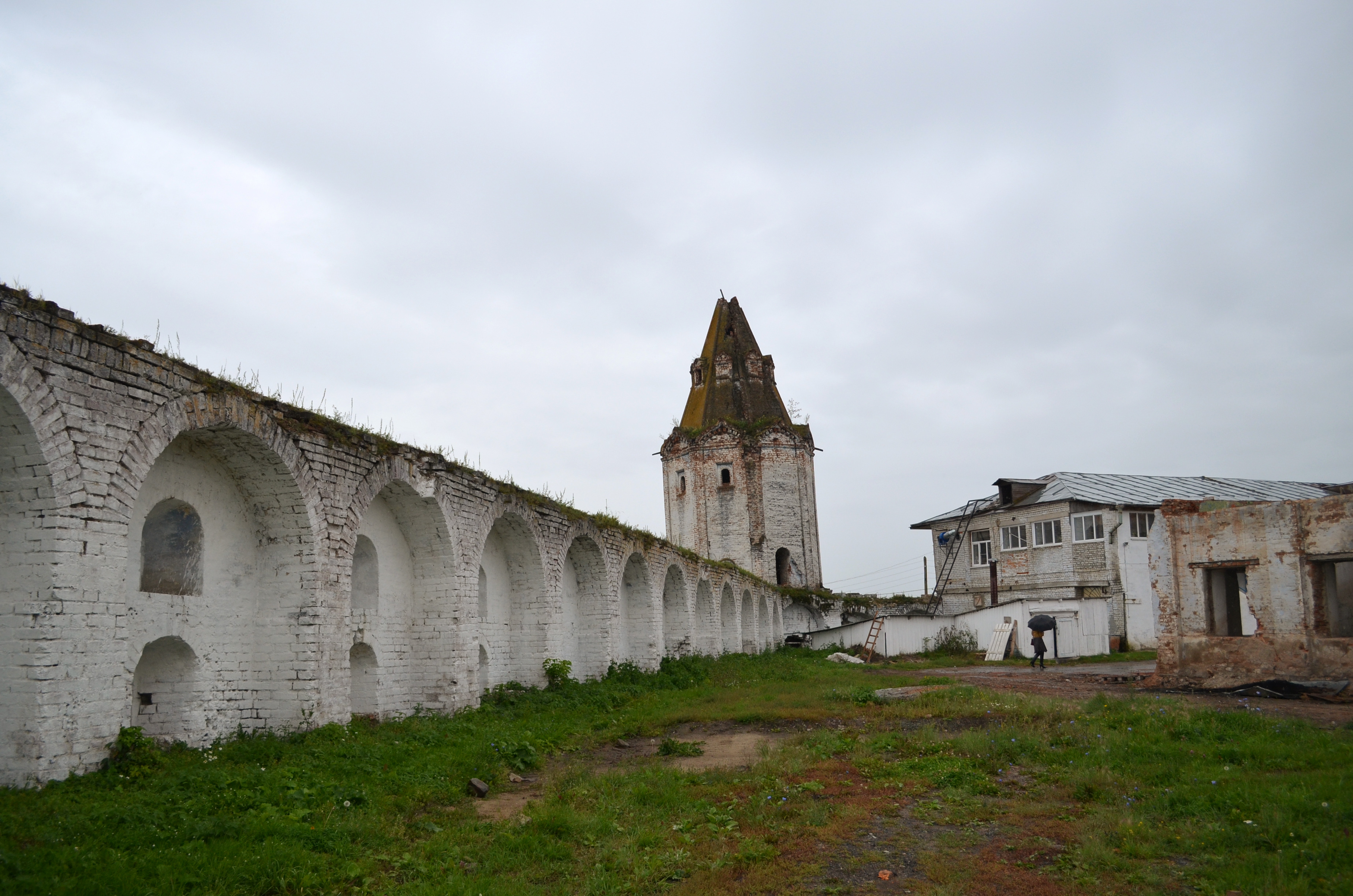 Красный бастион (башня западная) (руины) (Курганская область, Далматово, улица Советская, 63)